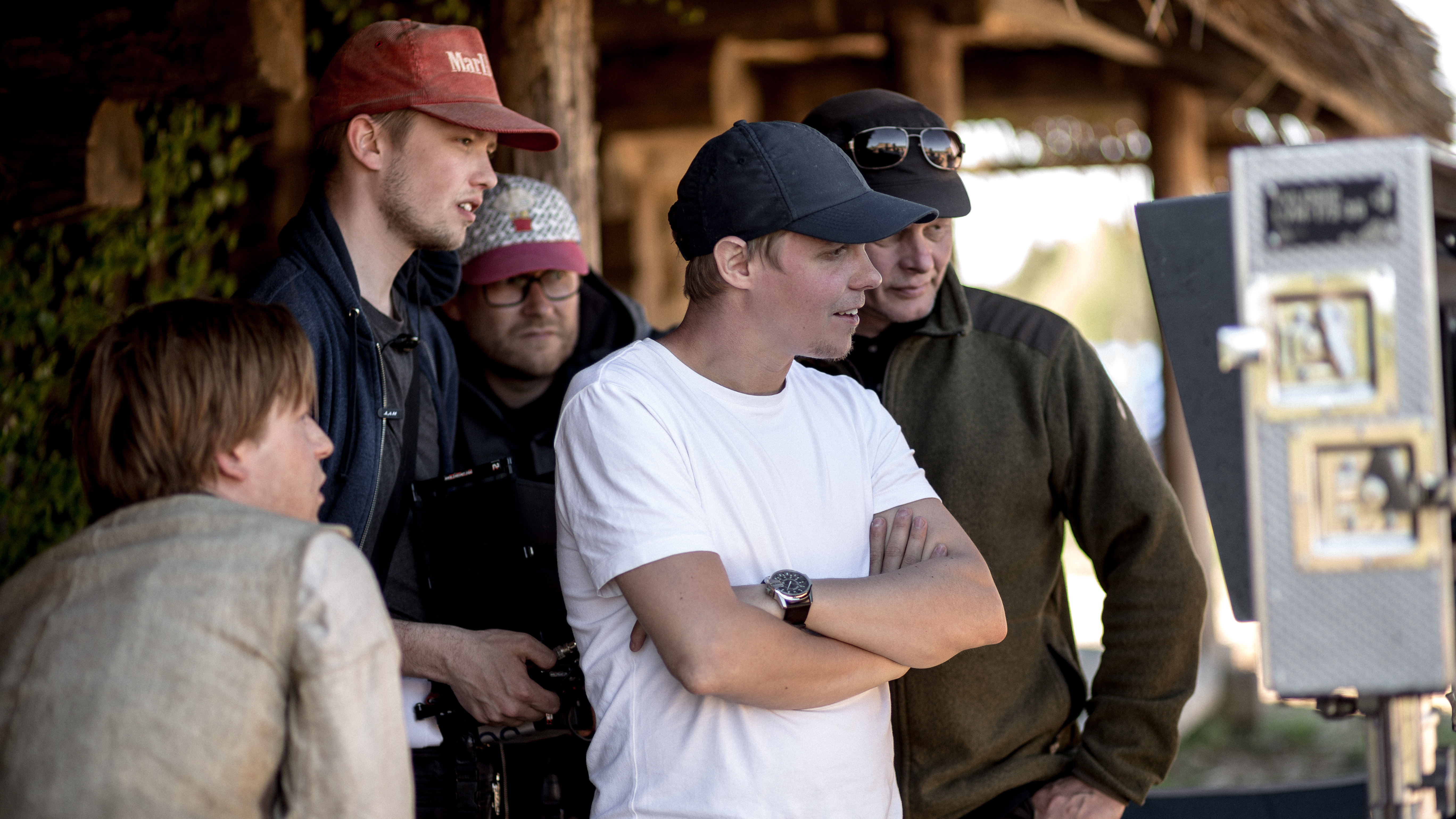 Tanel Toom filmi "Tõde ja Õigus" võtetel